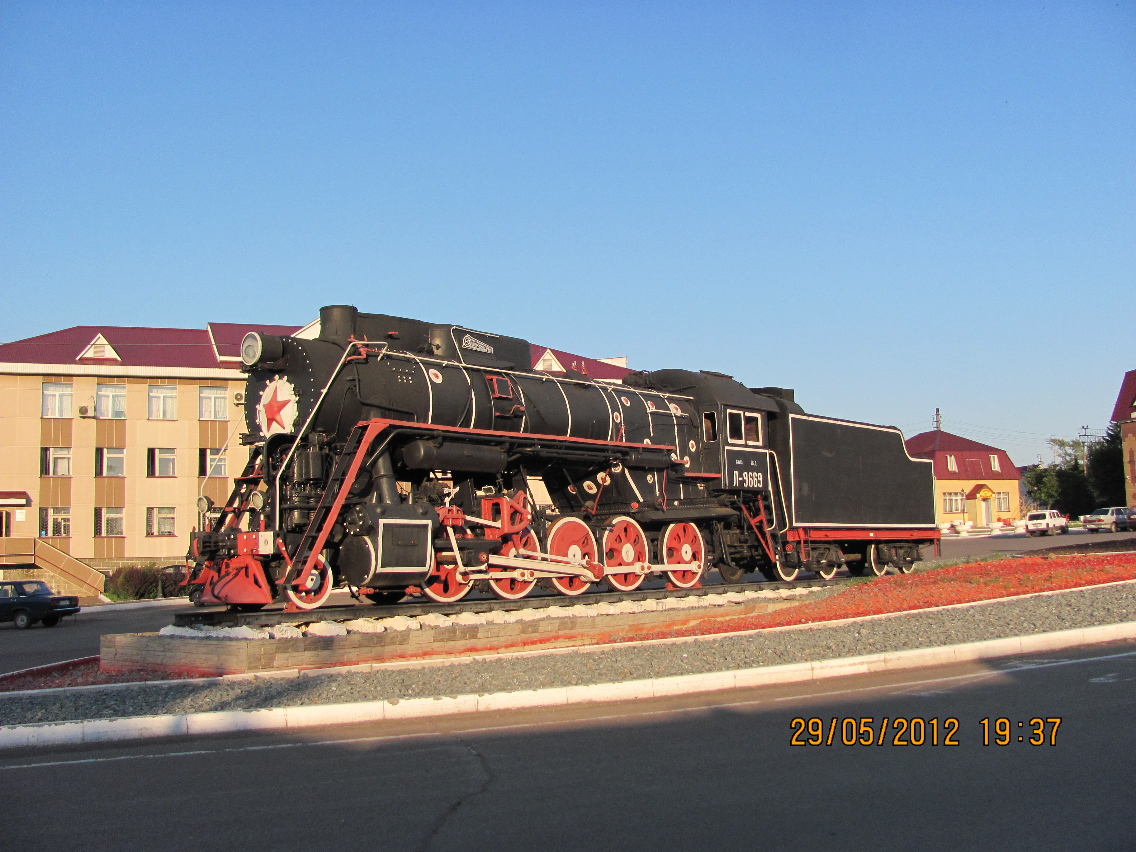 Памятник паровоз Л-1765 (№9669)